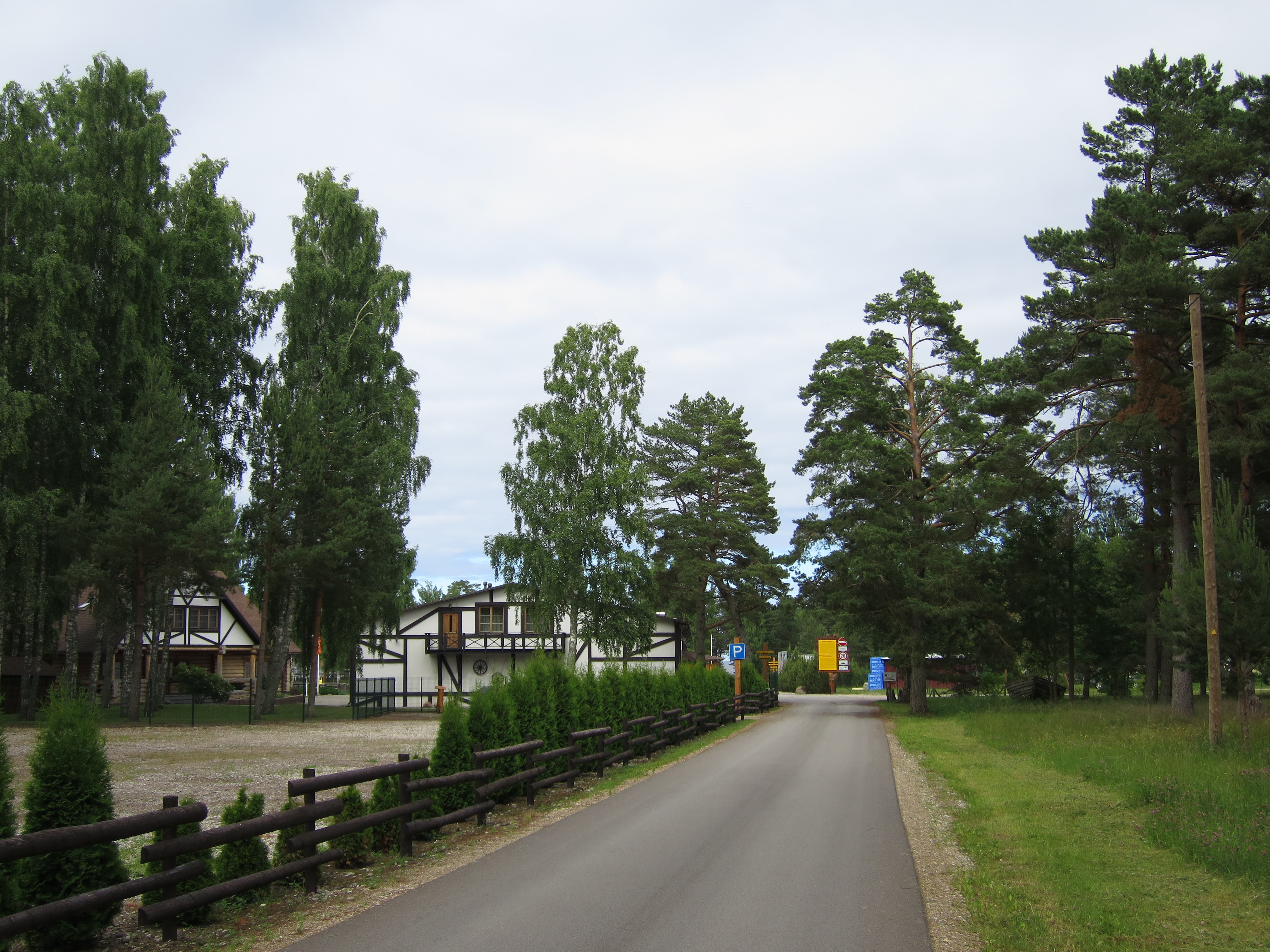 Ceļš uz atpūtas kompleksu "Dzintarkrasts"